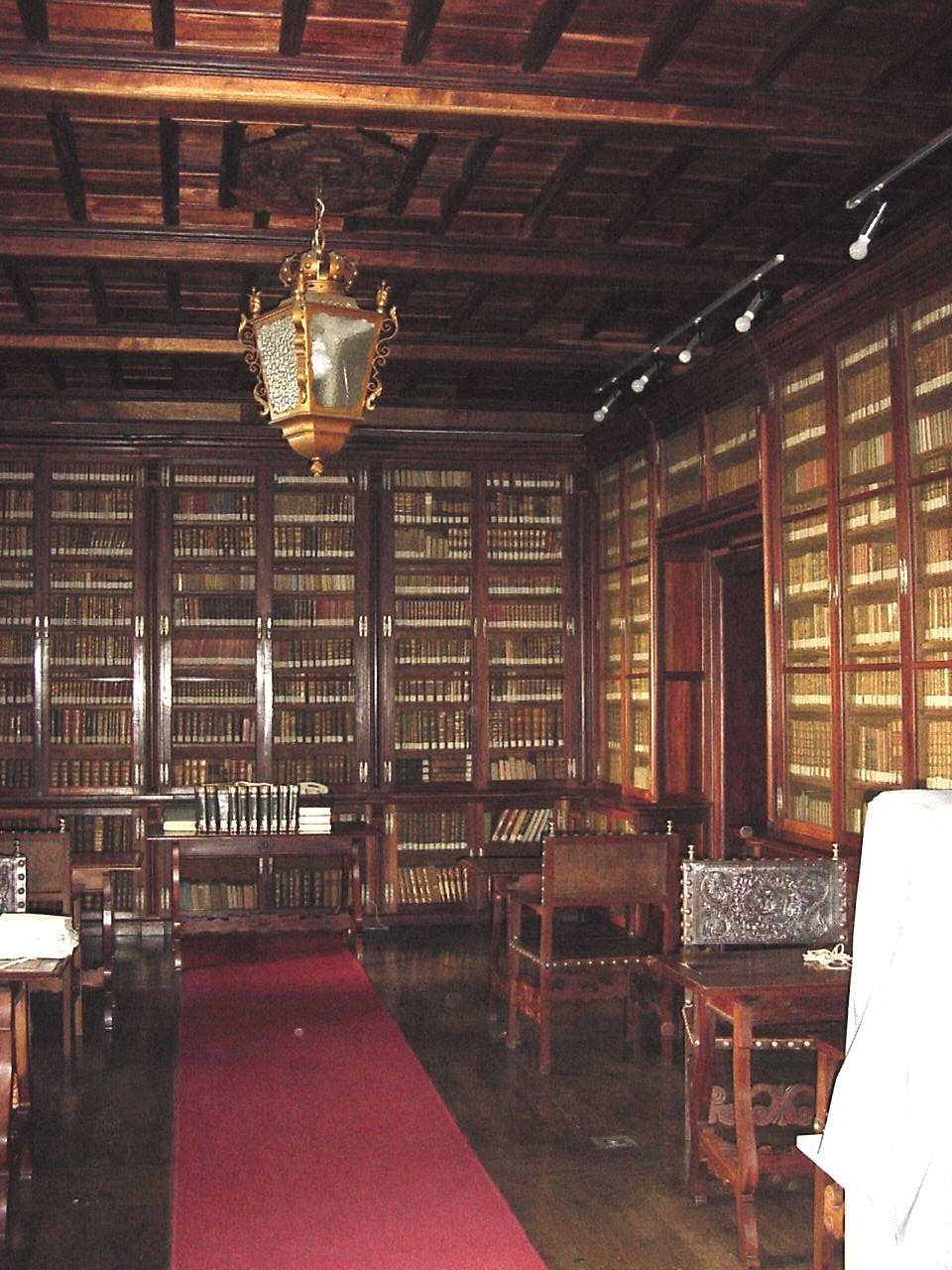 Palácio Bettencourt, Sala de consulta, ilha terceira, Açores, Portugal.